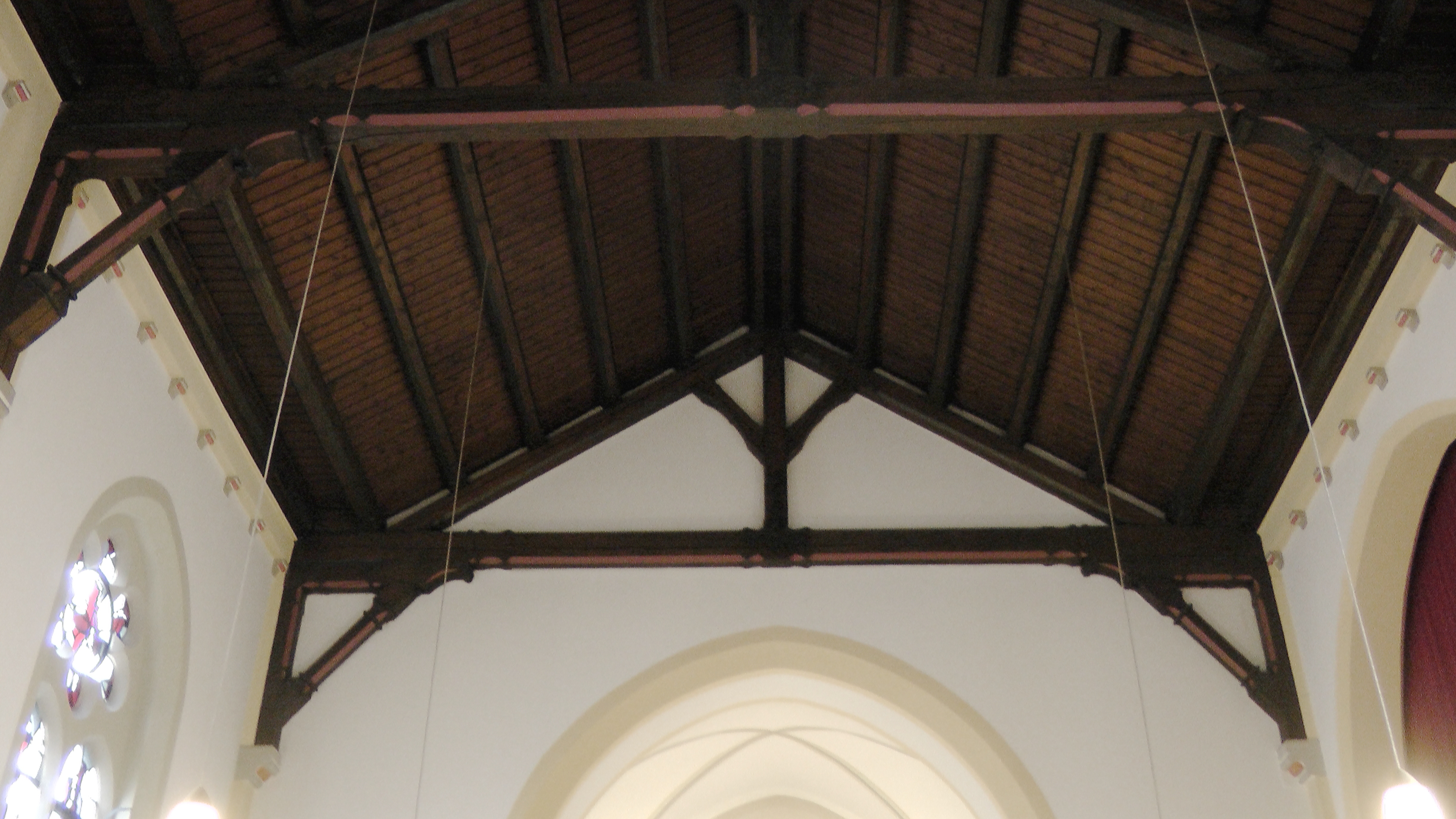 Evangelische Kirche Konz-Karthaus Dachkonstruktion